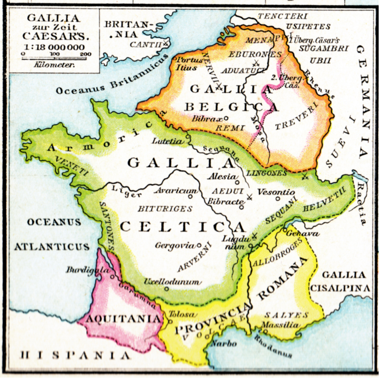 La Gallia romana al tempo di Cesare (50 a.C.)